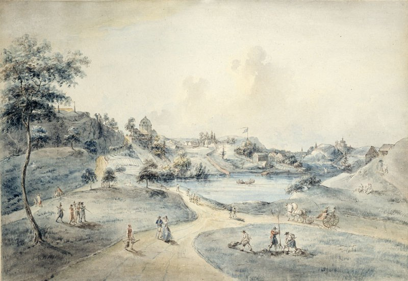 Parken vid Bellvue från nordväst. Bellevue, sett från Hagaparken med Observatoriet i bakgrunden på 1780-talet. Utgiven av: Stockholms stadsmuseum. Objekt-ID: Inventarienummer SSM 8316. Konstnär: Johan Fredrik Martin (1755-1816). Material och teknik: Akvarellerad konturetsning. Underlag: Papper. Mått i mm: 275X390.Sjön i mitten är dåvarande Ormträsket belägen ungefär vid nuvarande Wenner-Gren Center, därbakom staden med Jakobs kyrktorn och Adolf Fredriks kyrktorn och på Brunkebergsåsen till höger Stockholms gamla observatorium (Observatoriet). Till höger om sjön syns Generalsbacken, en del av Stockholmsåsen (Brunkebergsåsen), som vid denna tid nådde upp till ca 30 m höjd.